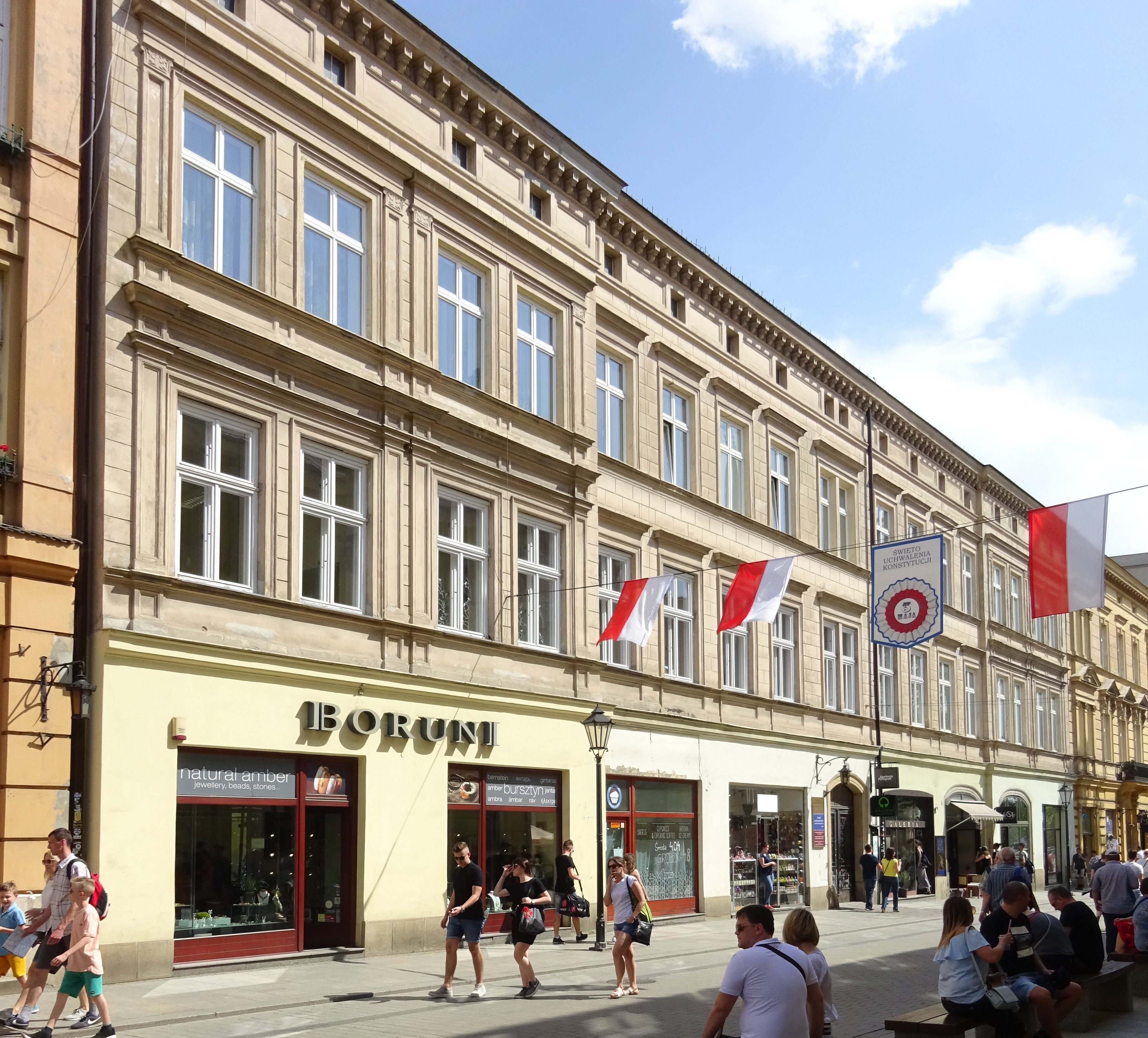 Dwór Odrowążów w Krakowie przy ulicy Grodzkiej 60.